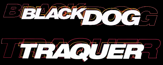 Logo du film Traquer